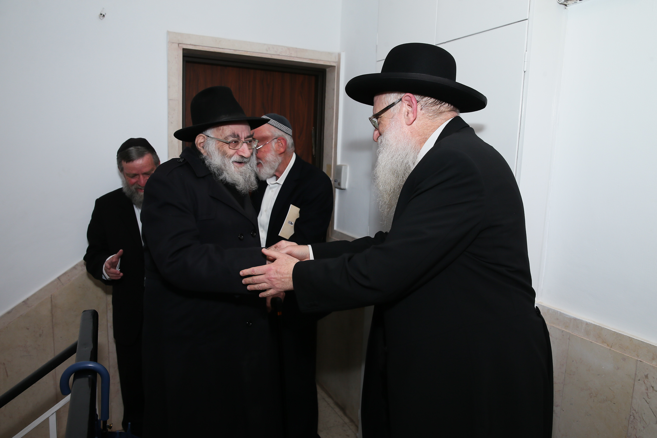 הרב יהושע רוזן בפתח ביתו של הרב מגנס